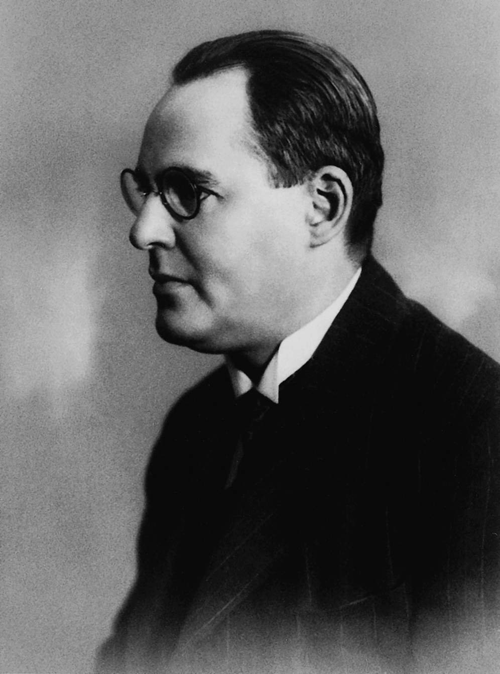 Siklós Albert magyar zeneszerző, zenei szakíró, zenepedagógus.